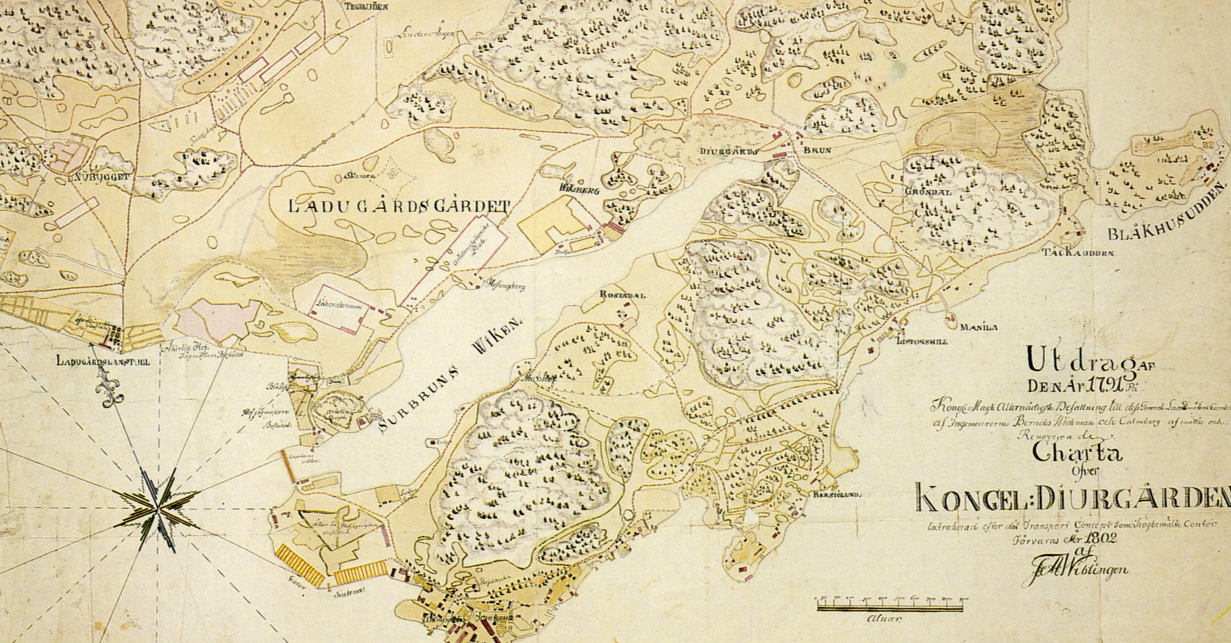 Charta öfver Kongel: Djurgården år 1802